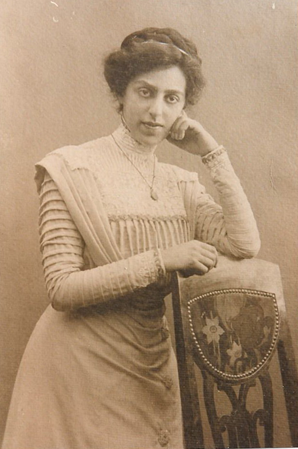 קטה דן